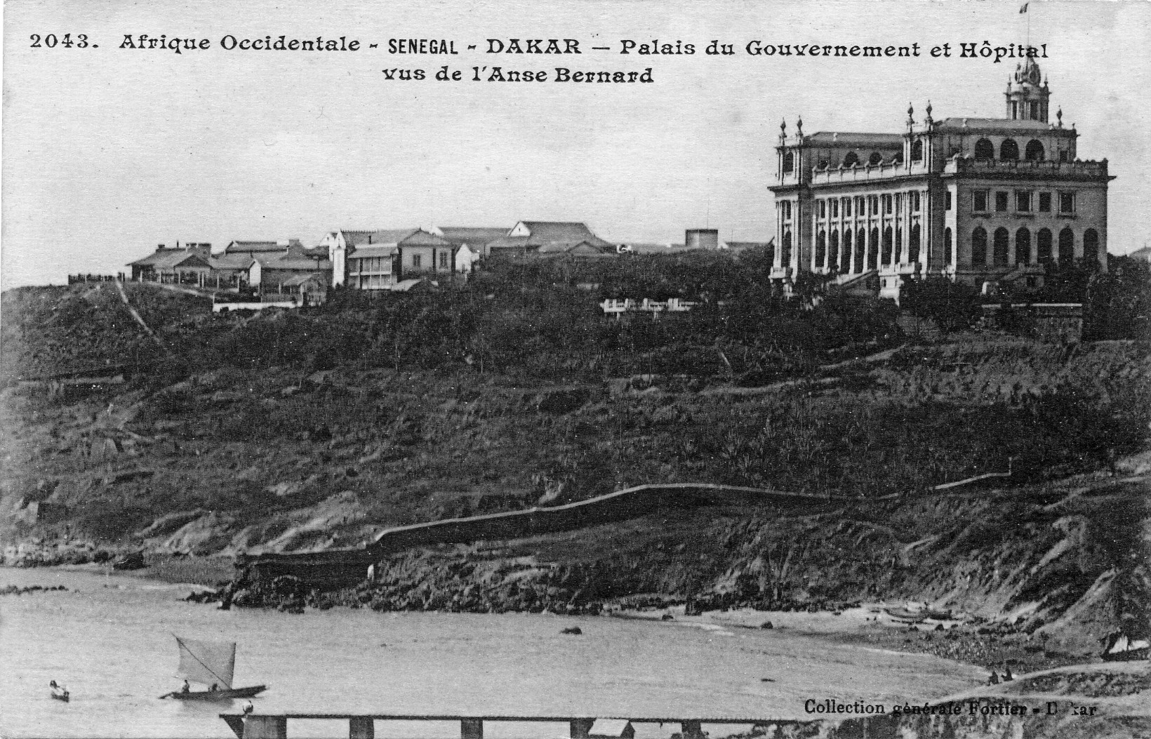 "Afrique Occidentale - Sénégal - DAKAR - Palais du Gouvernement et Hôpital vus de l'Anse Bernard"